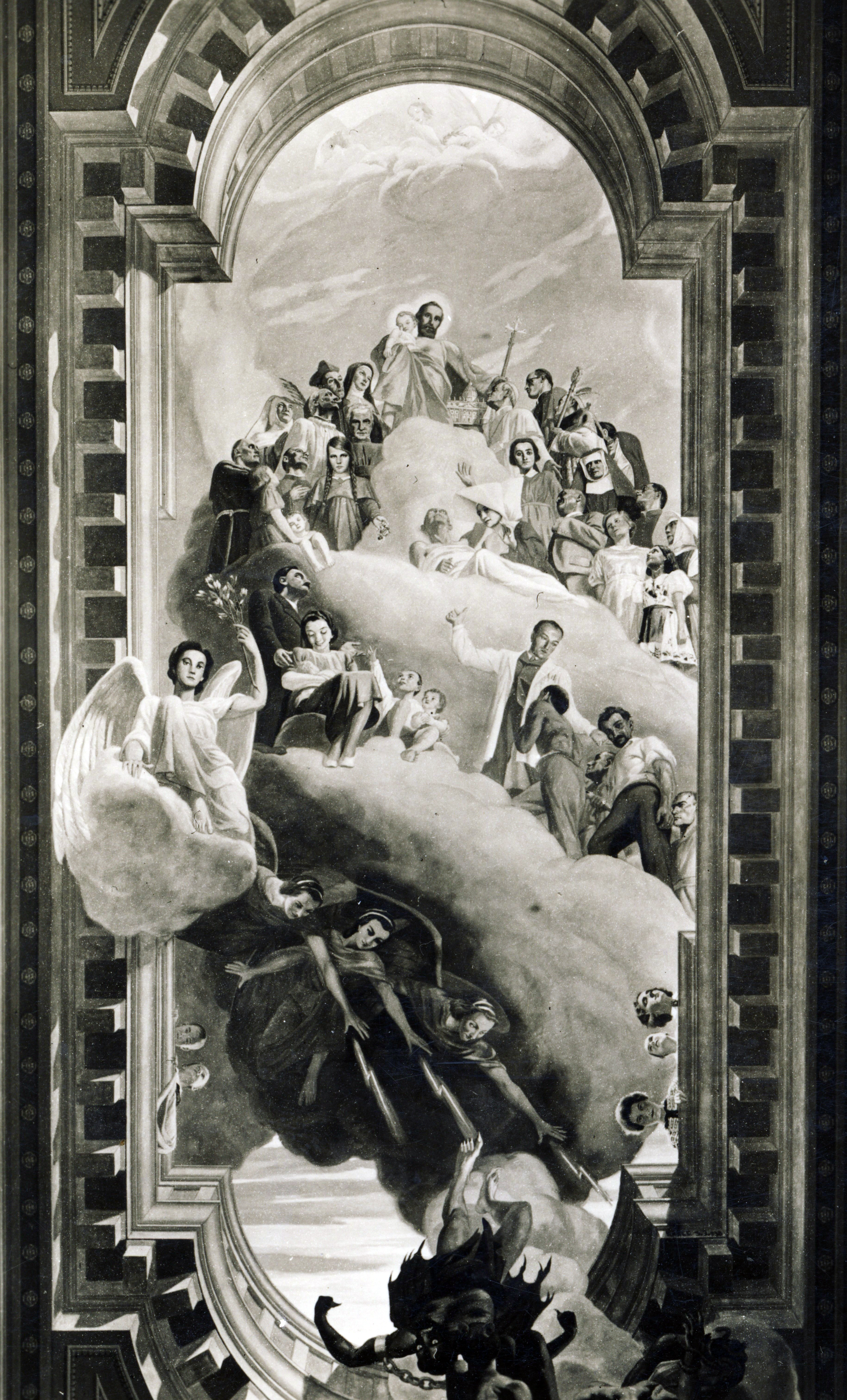 a Szent József-templom freskója. Location: Hungary, Szeged Tags: fresco Title: a Szent József-templom freskója.